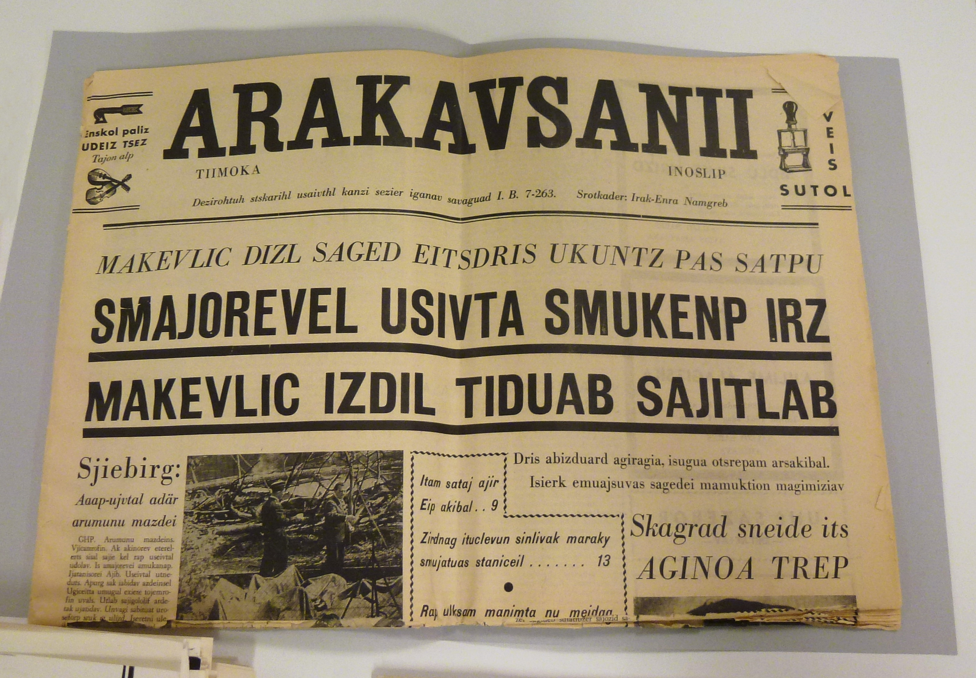 Tidningen "ARAKAVSANII" i fantasispråk. Från Bergmanfilmen Tystnaden från 1963. Finns i Ingmar Bergman-arkivet på Filmhuset.